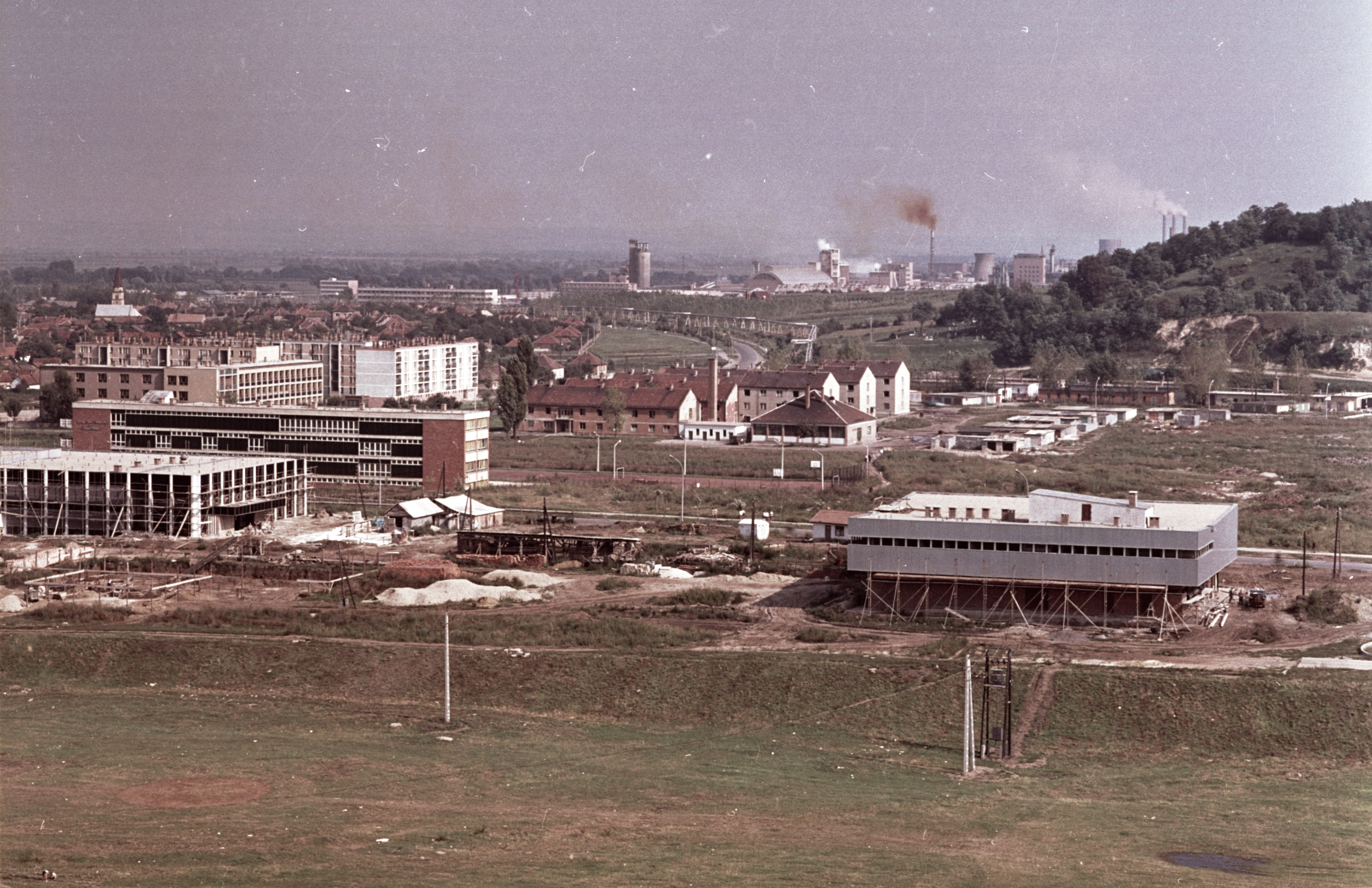 Panorámakép az épülő városról a Városi Kórház tetejéről nézve. Háttérben a Borsodi Vegyi Kombinát (ma BorsodChem) komplexuma. Location: Hungary Tags: picture, colorful, construction, factory, smoke Title: Panorámakép az épülő városról a Városi Kórház tetejéről nézve. Háttérben a Borsodi Vegyi Kombinát (ma BorsodChem) komplexuma.